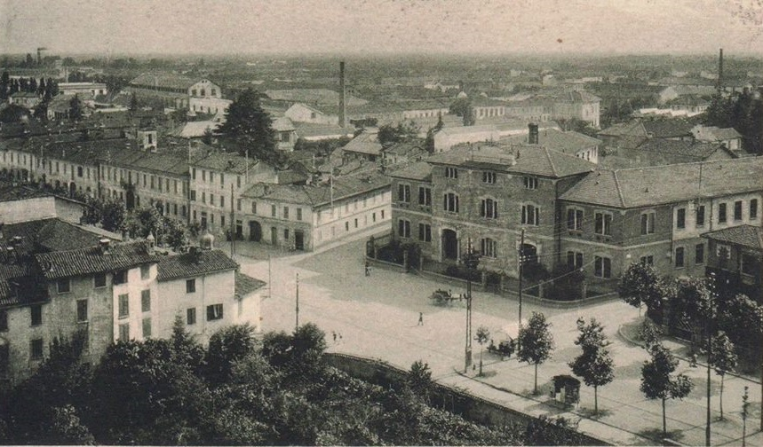 Piazza Manzoni vista dal campanile di san Michele